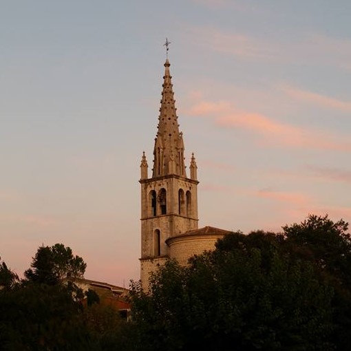 Clocher de l'église de Chandolas